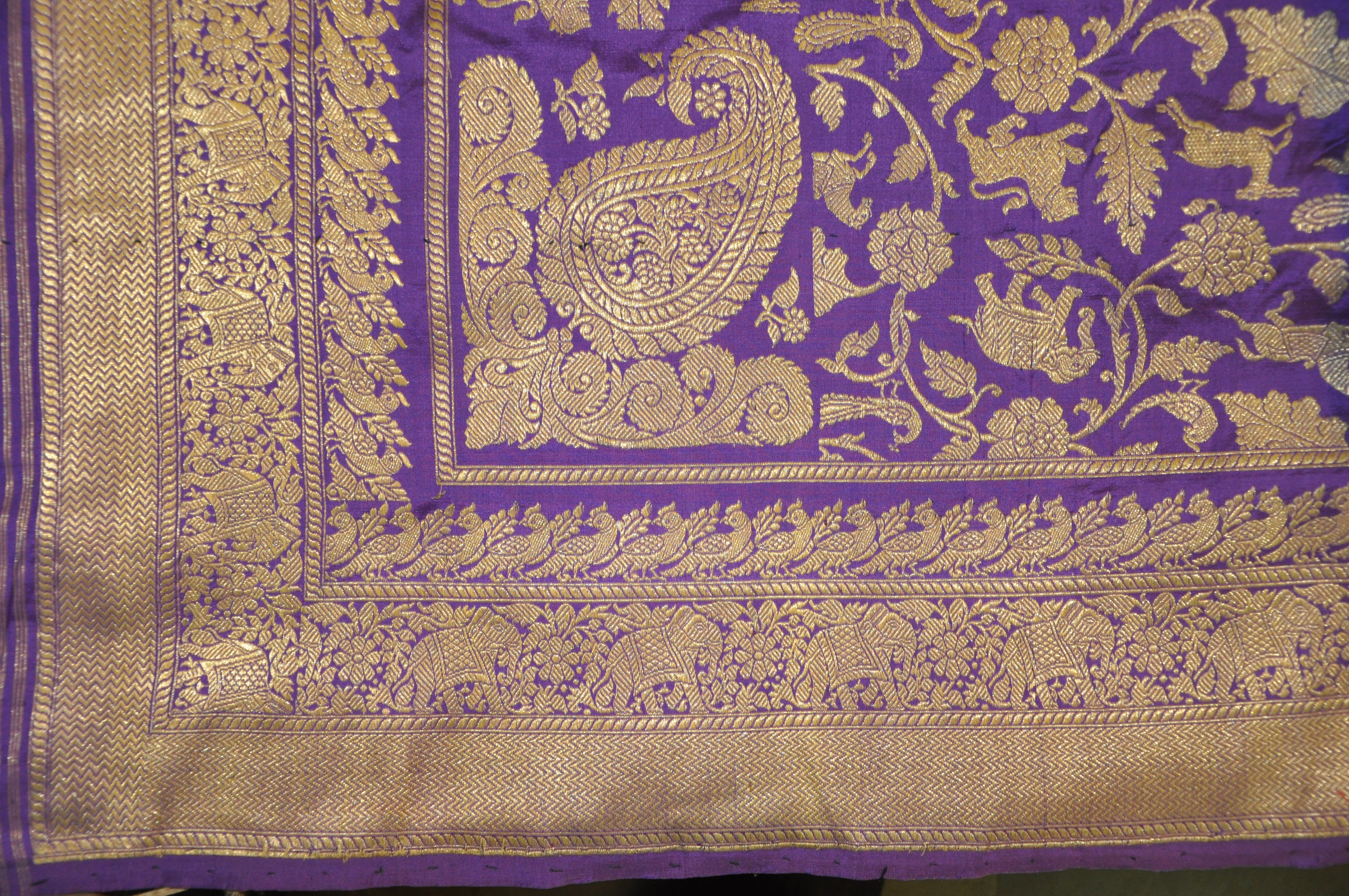 कोनिया,पट्टी, बेल,जंगला व शिकारगाह